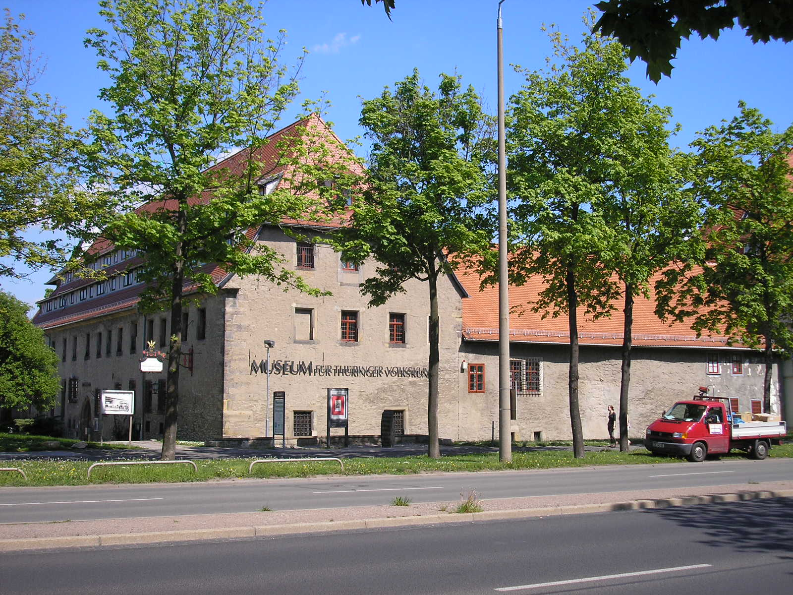 Das Volkskundemuseum am Juri-Gagarin-Ring in Erfurt (Thüringen).